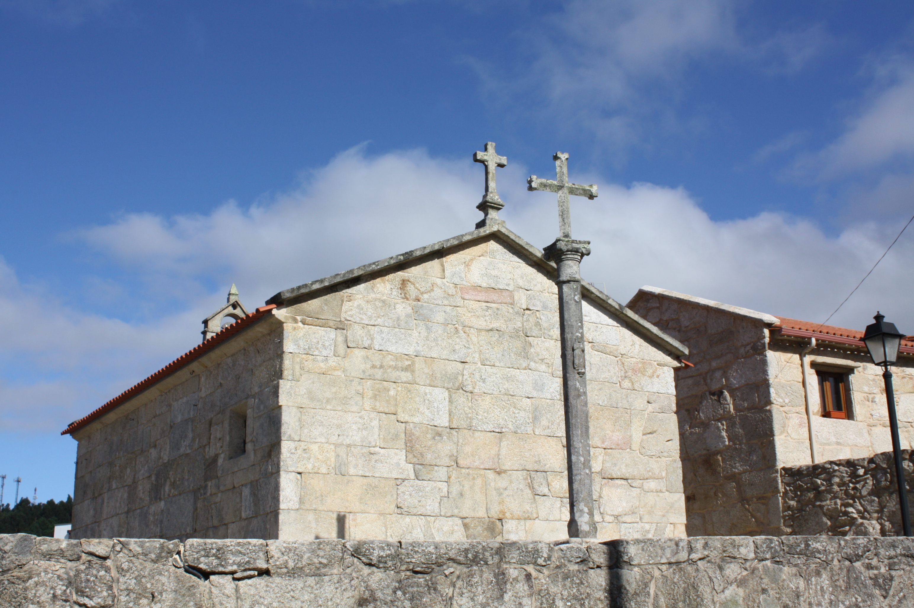 Cruceiro e capela de San Amaro, de San Xoán de Meaño, no concello de Meaño (Pontevedra)